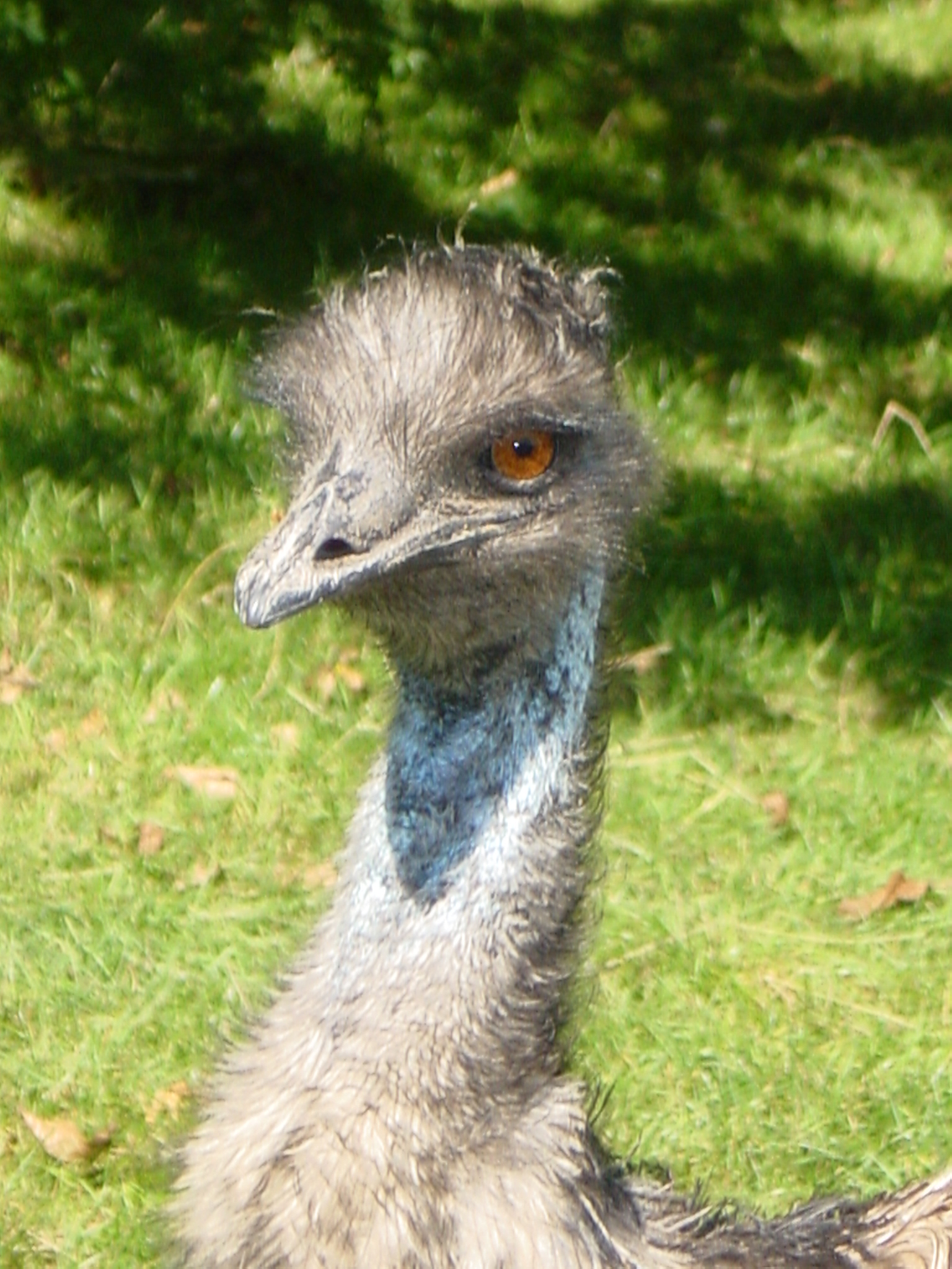 Surprised young emu - photo shooted in Zoo Zurich Erstauntes junges Emu - Foto im Zürcher Zoo geschossen